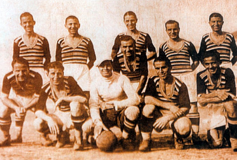 Η ενδεκάδα των Πρωταθλητών Θεσσαλονίκης 1936-1937. Από αριστερά όρθιοι: Κυρ. Μποστατζόγλου, Απ. Κοντόπουλος, Αρ. Ιωαννίδης, Κ. Καλογιάννης, Π. Βαφειάδης. Καθιστοί: Πανίδης, Αναστασιάδης, Ν. Σωτηριάδης (τερματοφύλακας), Κοσμίδης, Μοσχίδης, Βασιλειάδης.